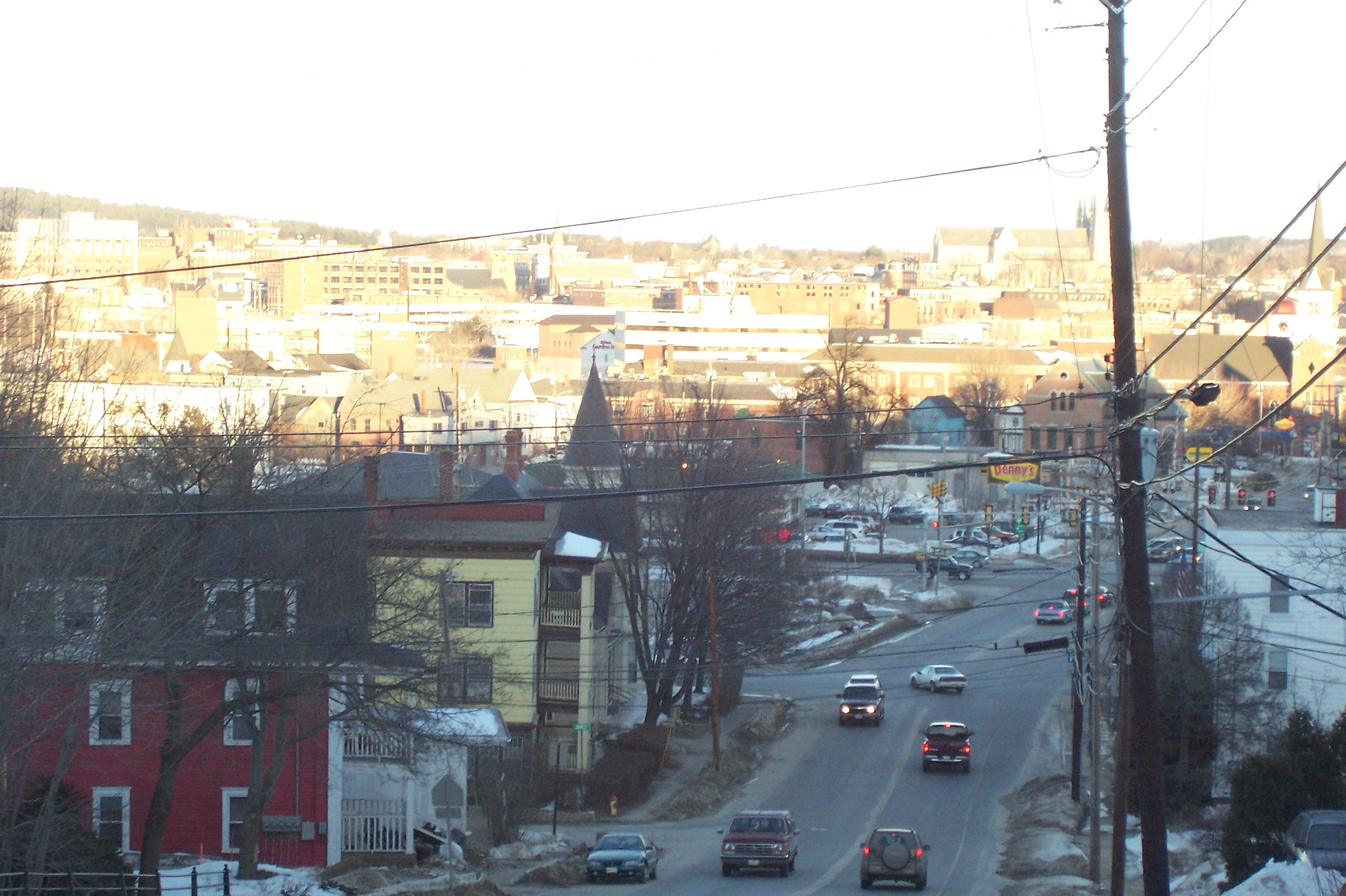 Auburn, Maine